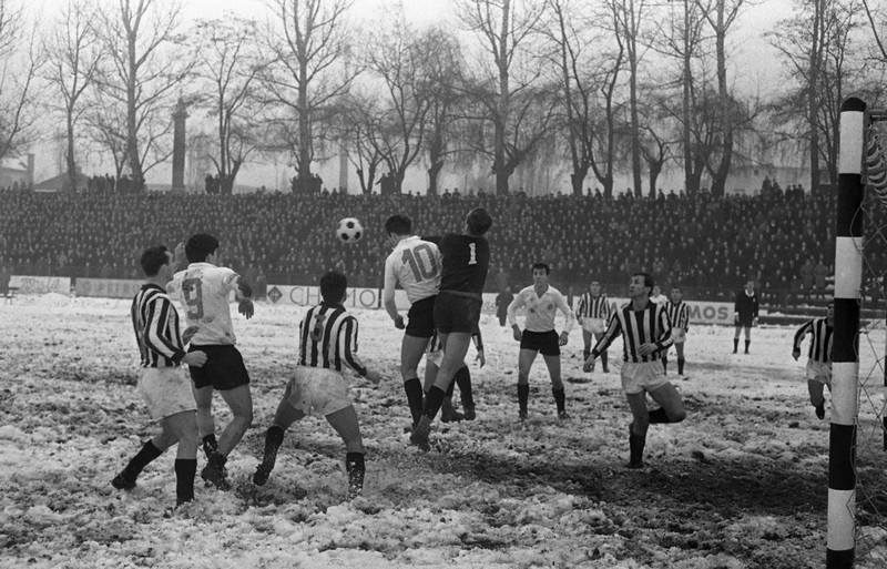 Visok poraz Partizana za Bežigradom.